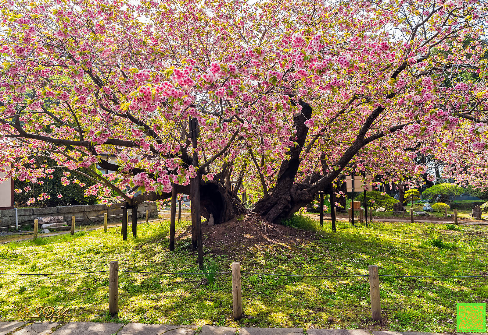 光善寺の満開の血脈桜。 shot by ほなみよしえ。(